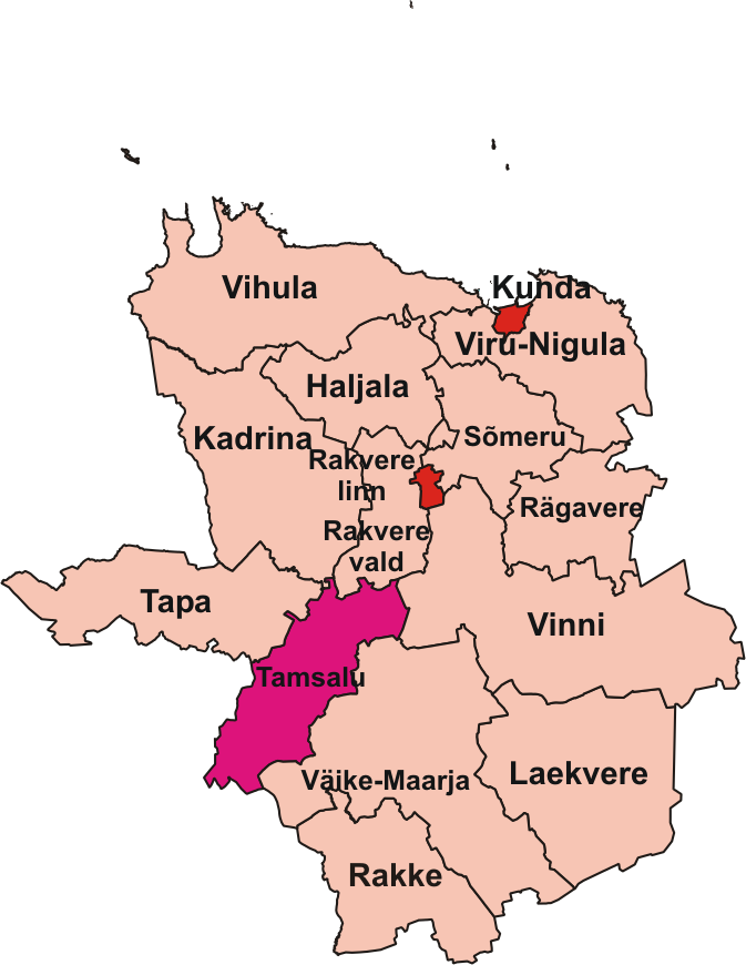 Tamsalu valla kaart.